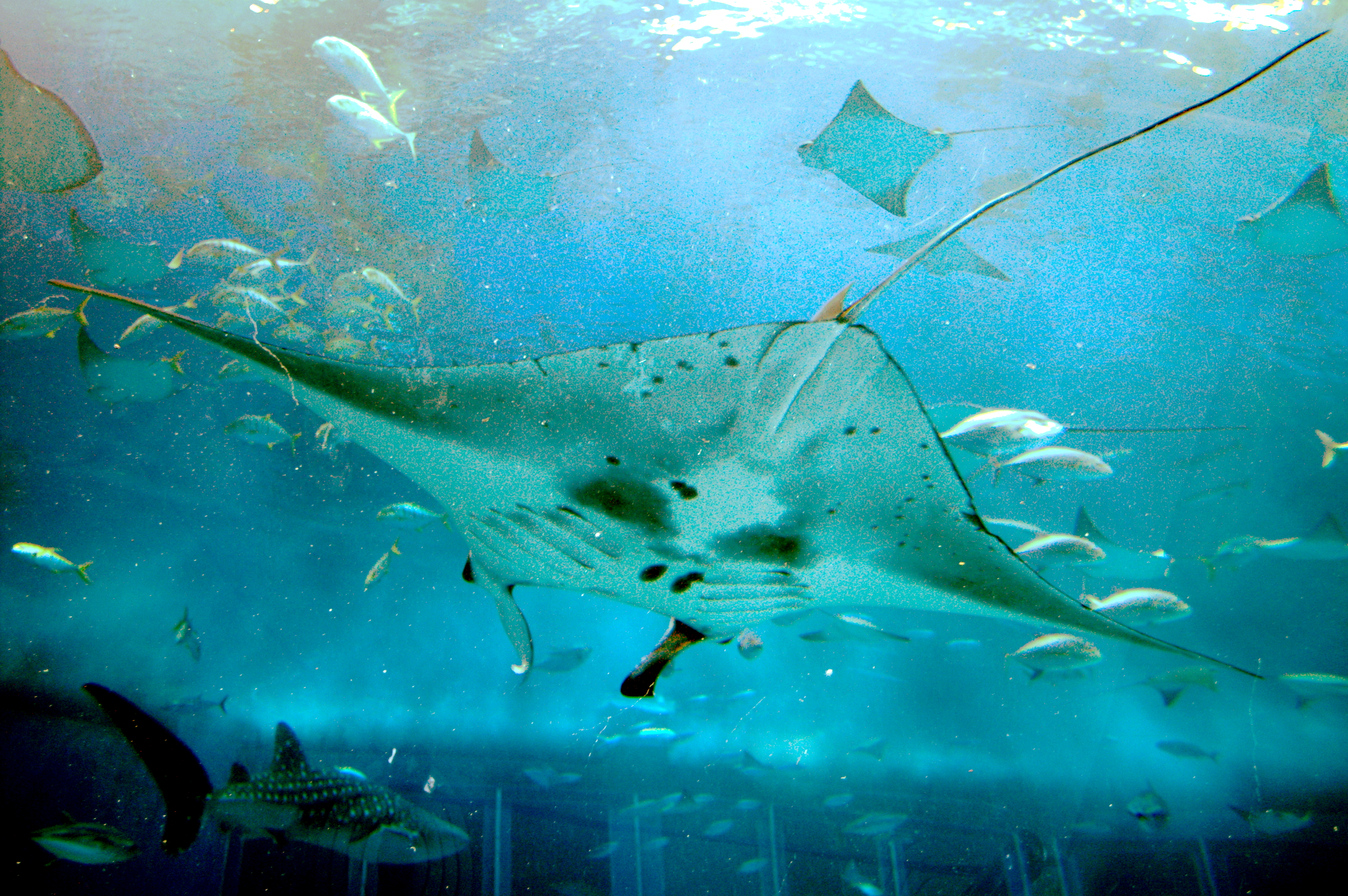 沖縄美ら海水族館の黒潮の海。ダイバーの憧れ、マンタ（オニイトマキエイ）。 (2007/02/01 Motobu, Kunigami, Okinawa, JAPAN)